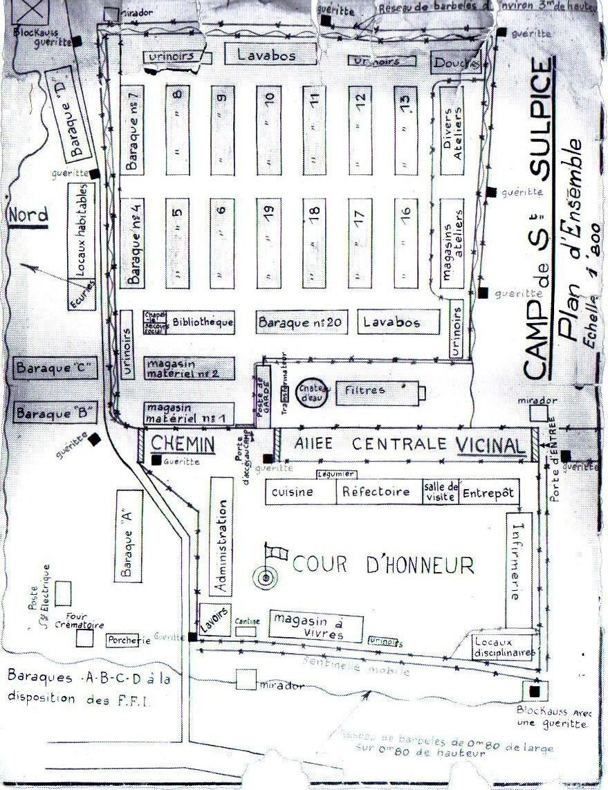 Plan du camp d'internement de Saint-Sulpice dans le Tarn en France (1940-1946)